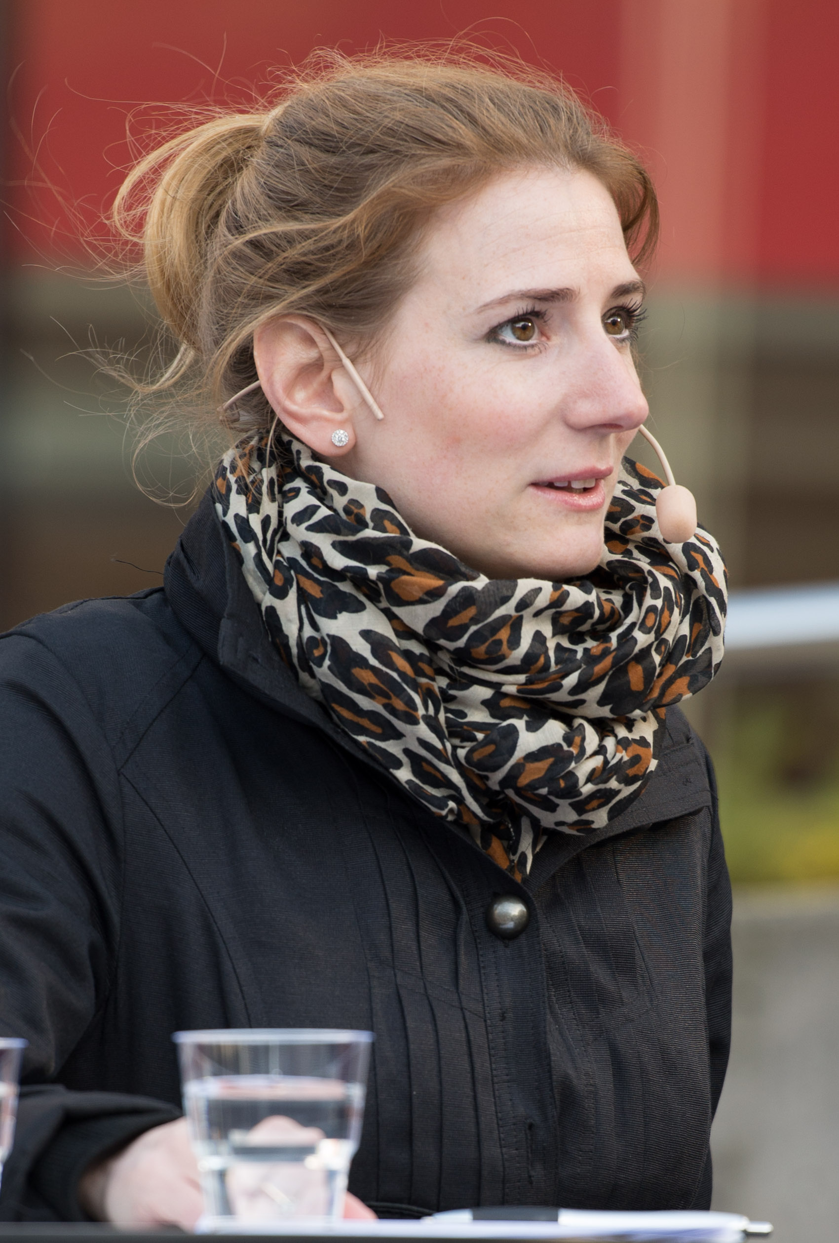 Caroline Szyber i en bostadsdebatt mitt på Sergels Torg i Stockholm. Arrangör: Kulturhuset Stadsteatern, Forum/Debatt, den 3 juni 2015.